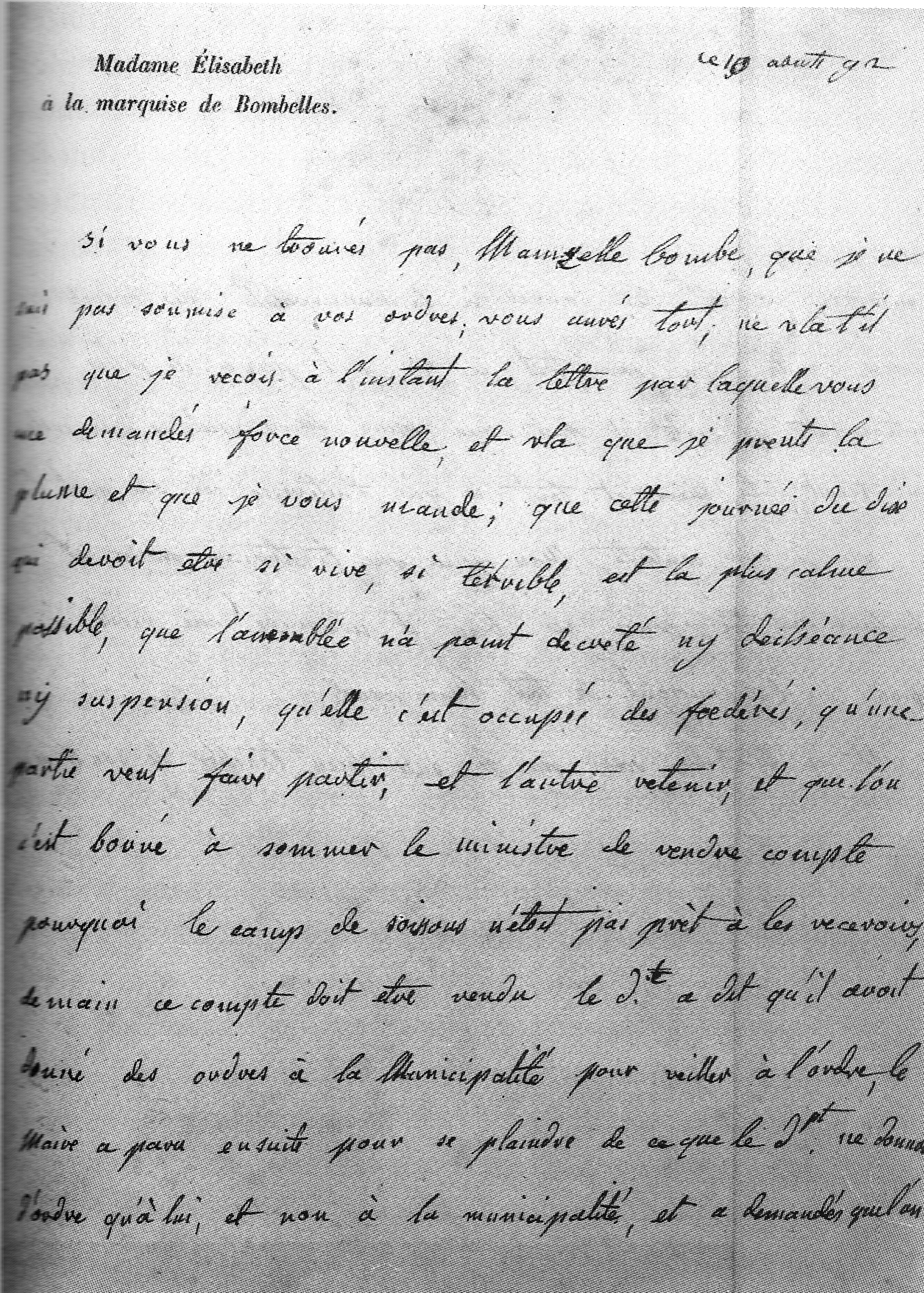 Bildunterschrift: Die erste Seite des letzten Briefes der Madame Elisabeth de France, Schwester König Ludwigs XVI., aus den Tuilerien zu Paris an Madame Angeélique de Bombelles in Schloss Wartegg vom 9. August 1792. Faksimile in Corr. Mme. Elisabeth.